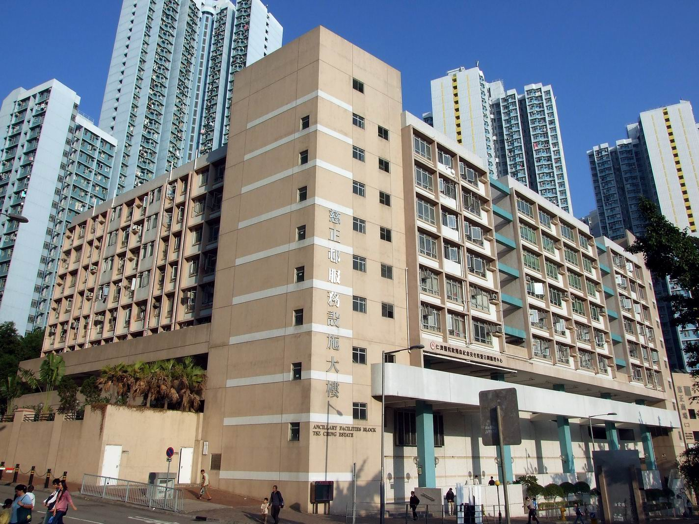 慈正邨服務設施大樓